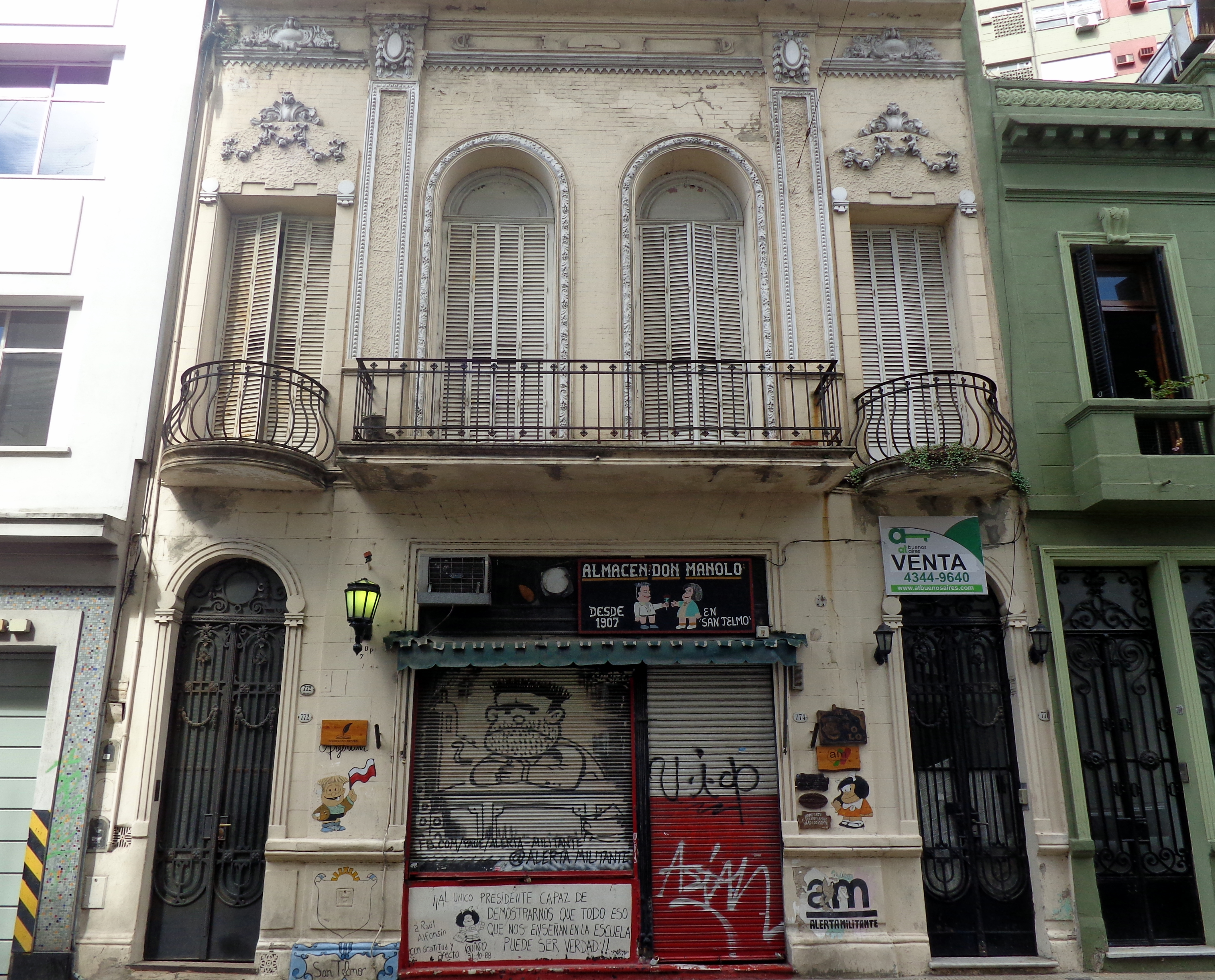 Almacén de Don Manolo. Quino se inspiró en él para crear el personaje de Manolito, en Mafalda. Queda en Defensa 772, Buenos Aires, Argentina.